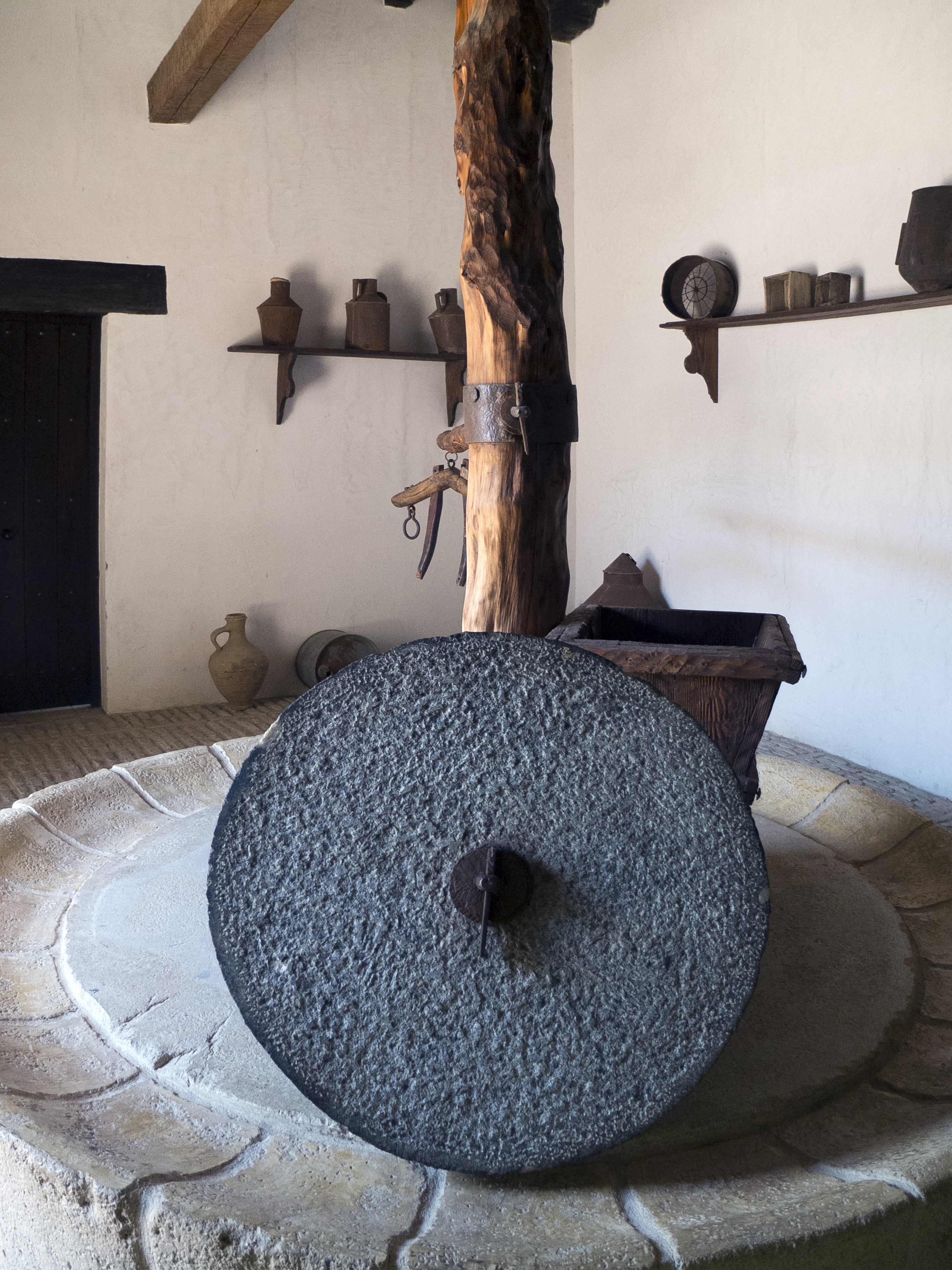 Murallas y Alcázar, con sus baños y Capilla